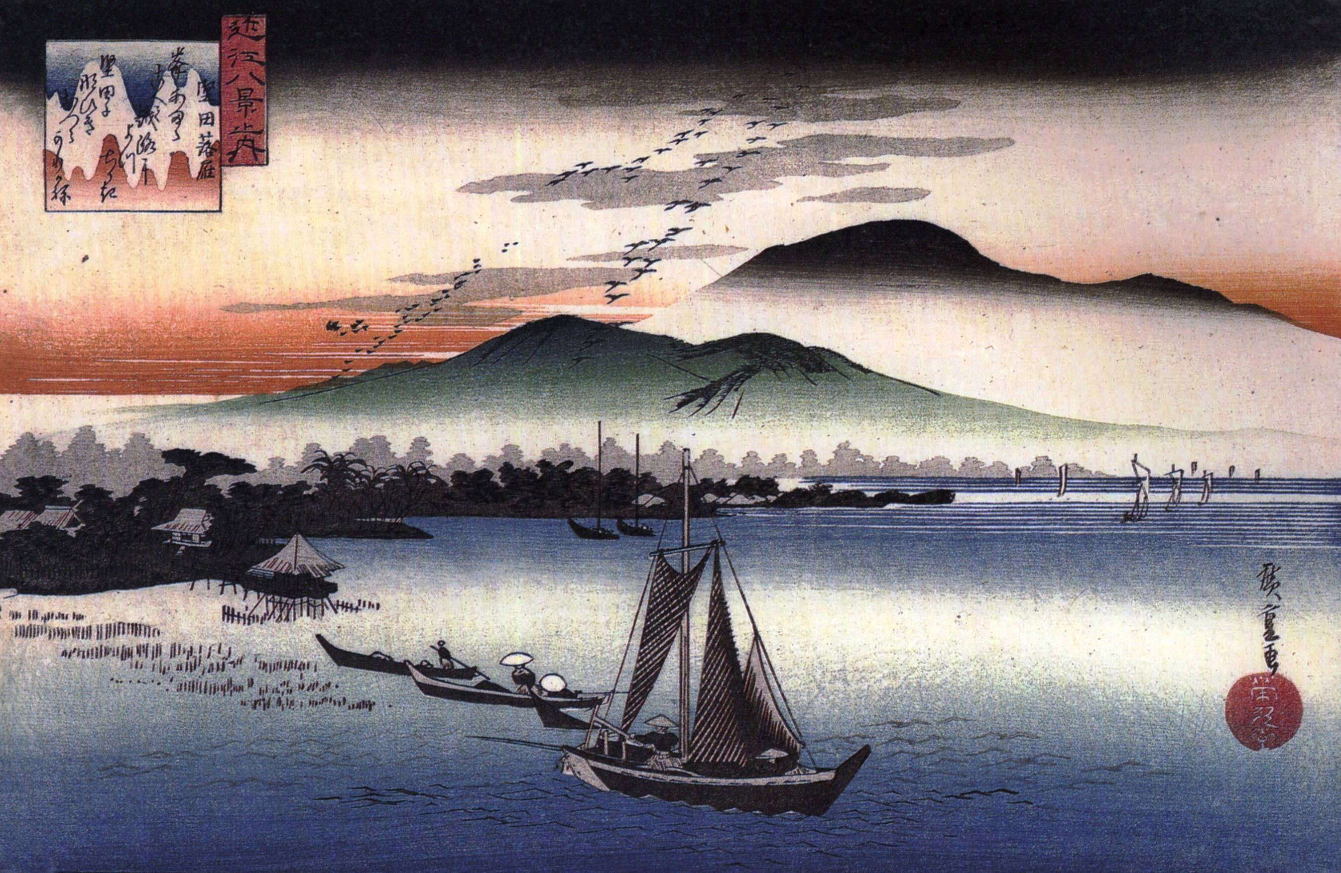 8 Views of Omi - #6. Descending Geese, Katata